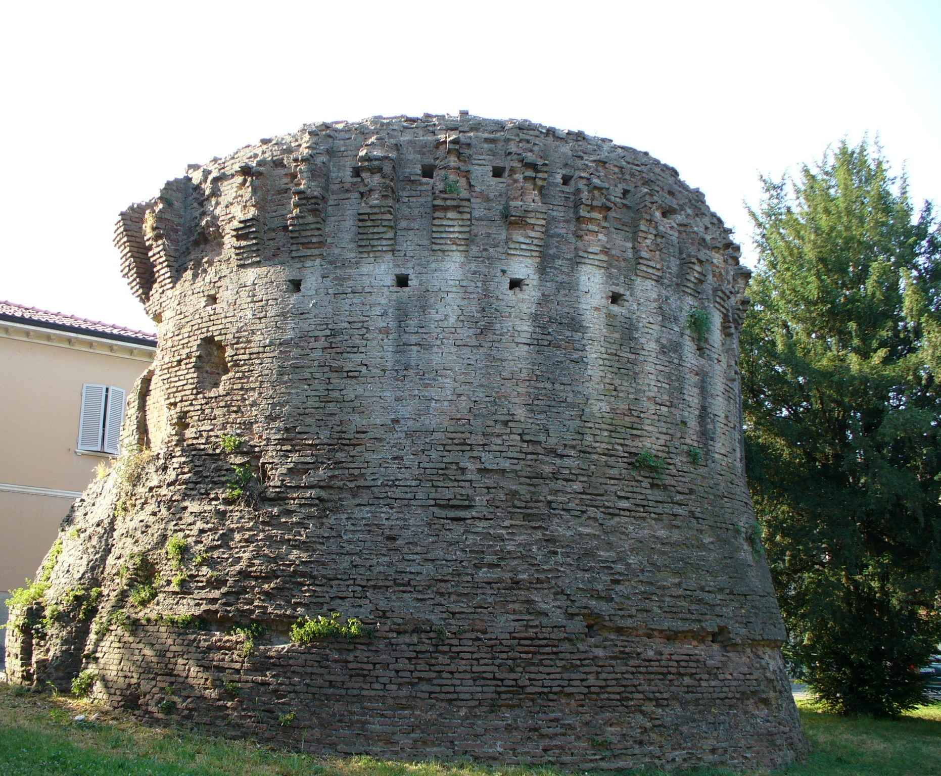 resti delle antiche fortificazioni a Russi (RA)